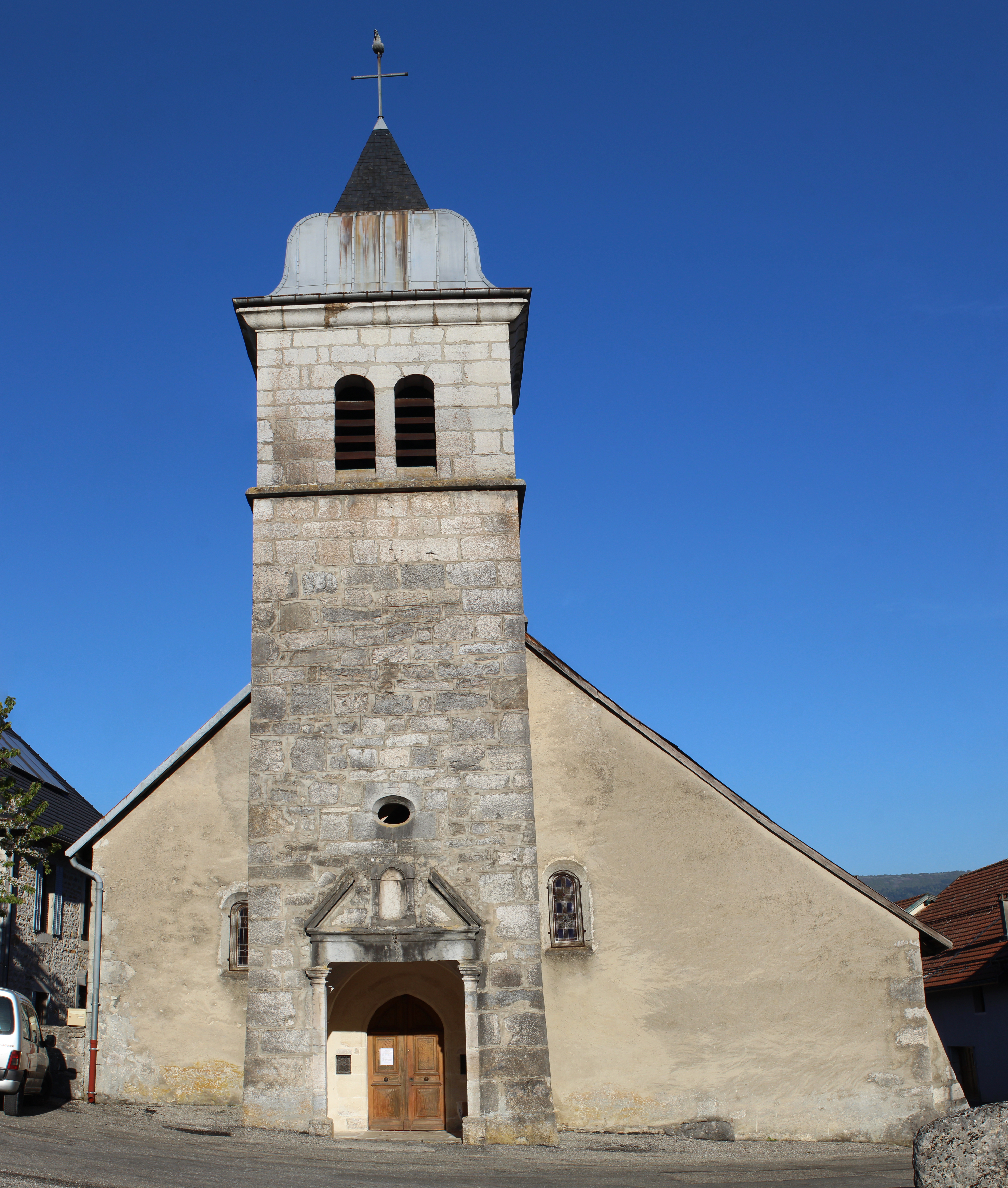 Église Saint-Didier de Ruffieu.